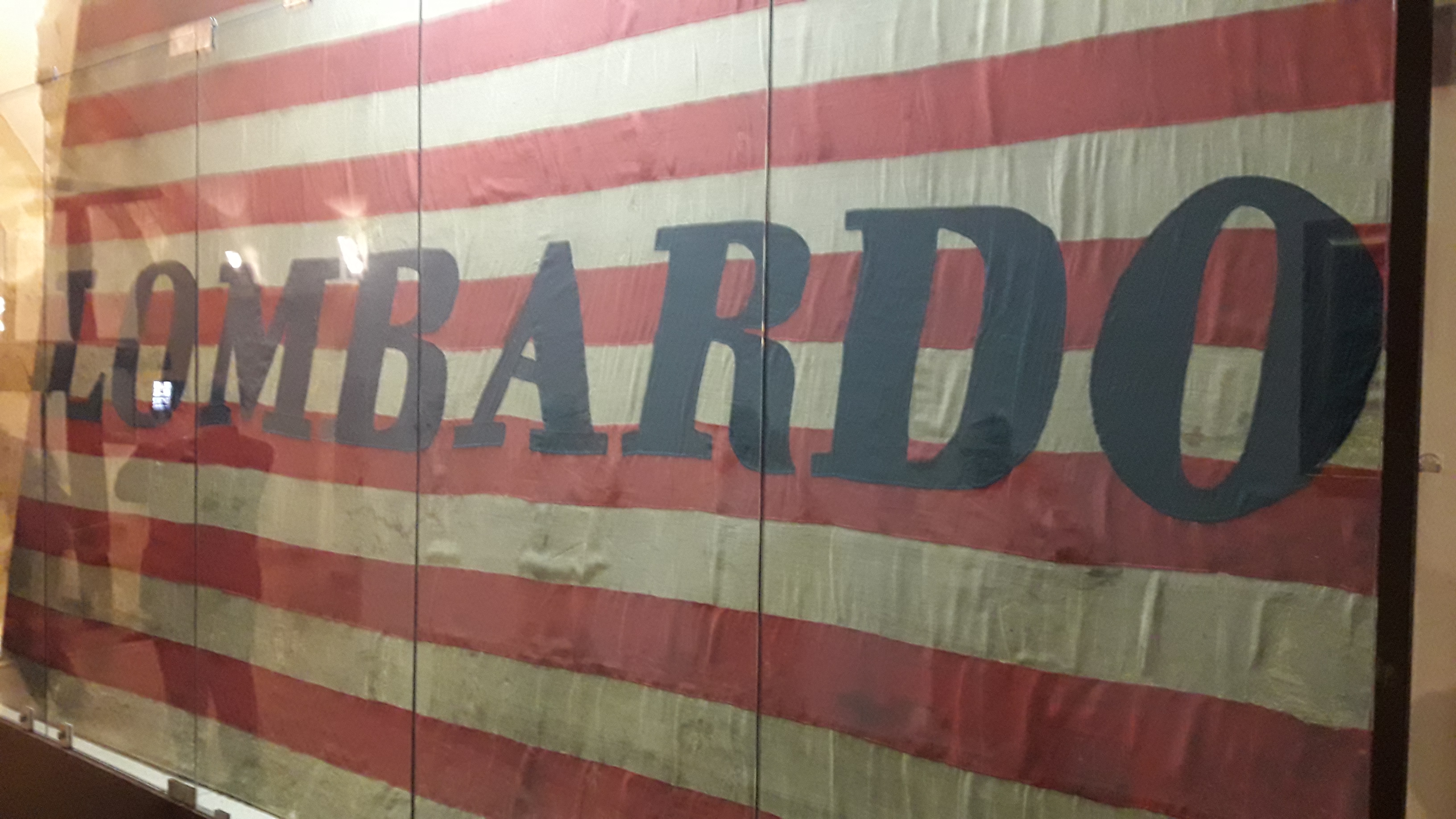 Il vessillo del "Lombardo", custodito al museo Pepoli di Trapani